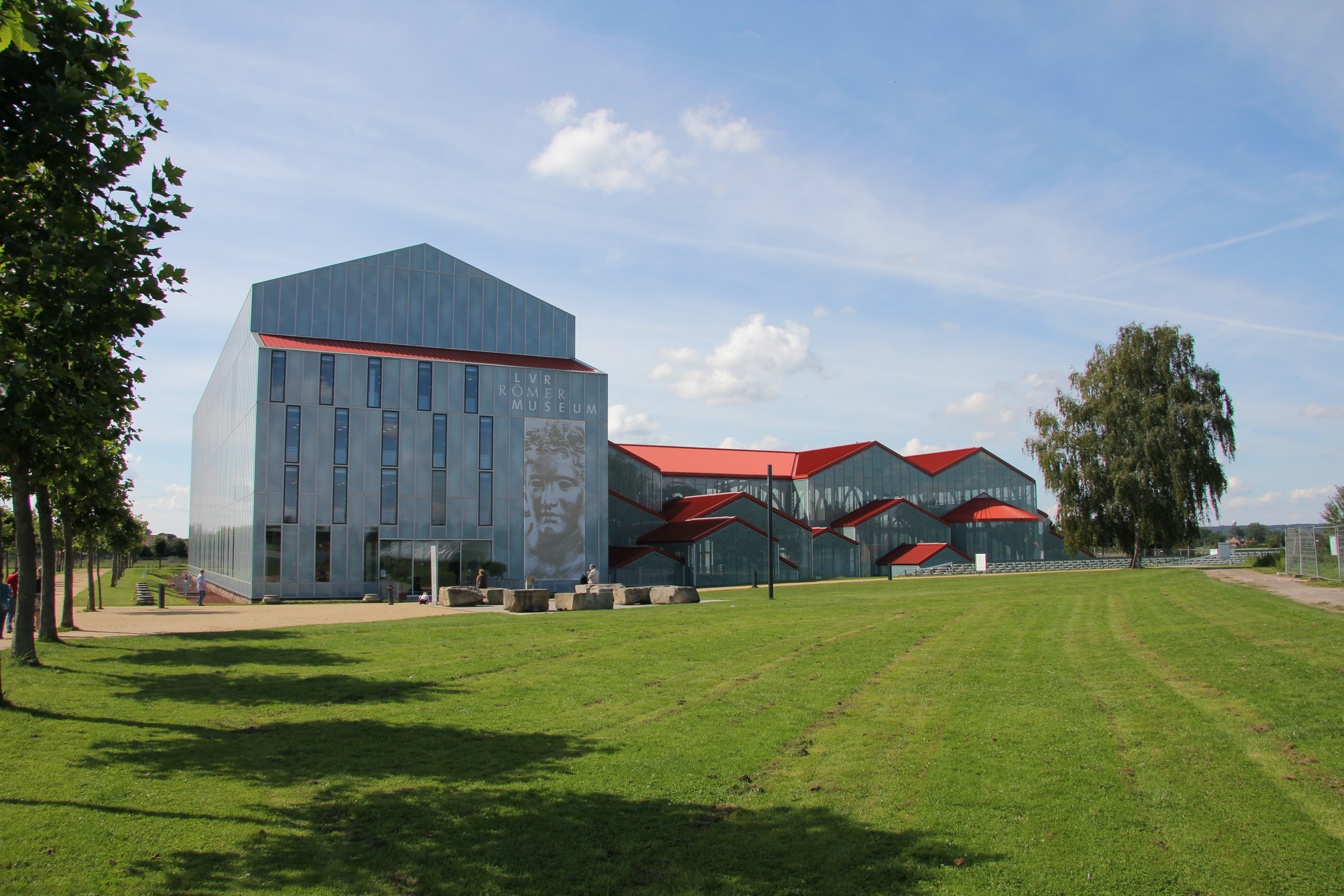 LVR-Archäologischer Park Xanten